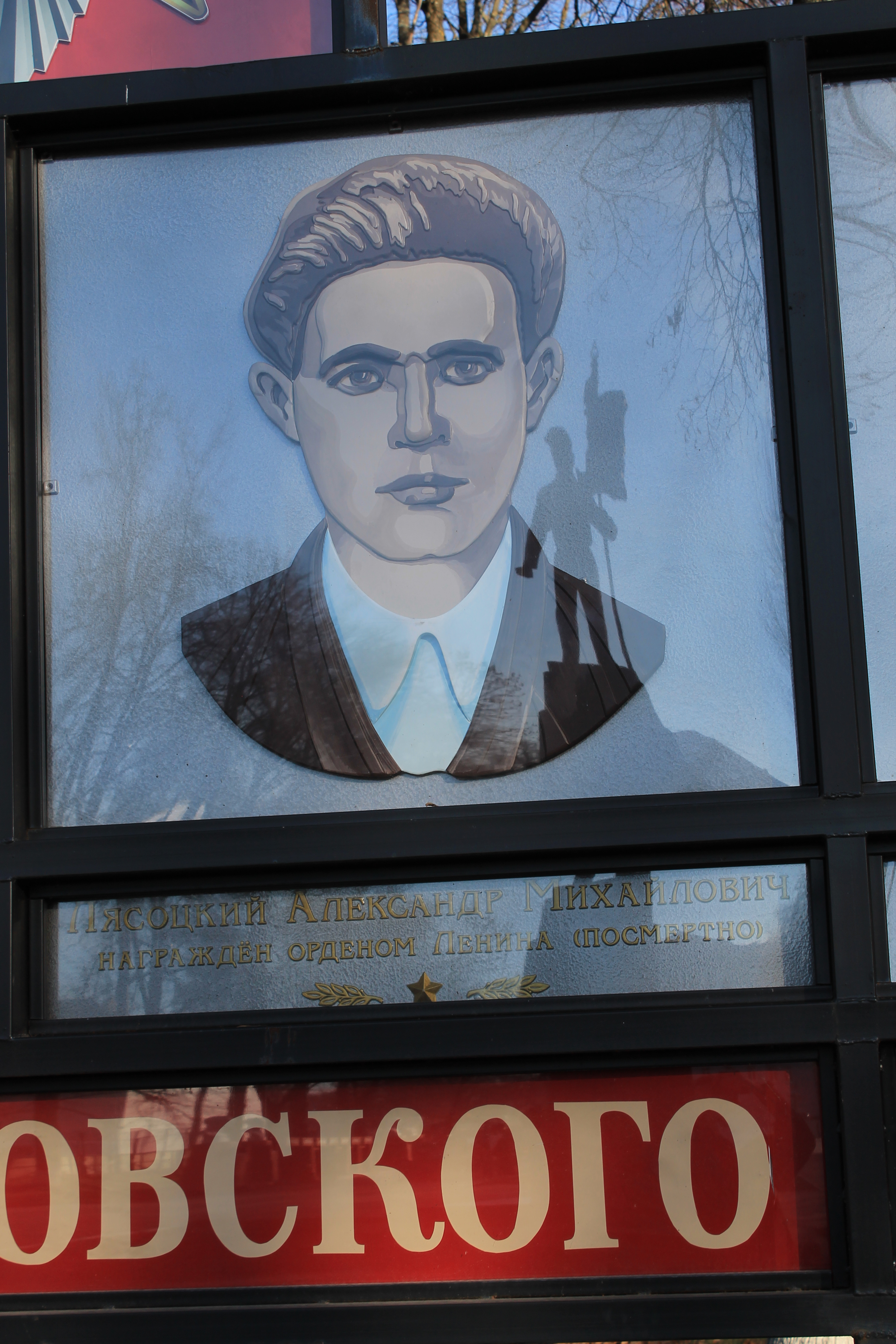 Памятник комсомольцам Людиновской комсомольской подпольной организации, погибшим в борьбе с немецко-фашистскими захватчиками в годы ВОВ (Калужская область, Людиново, Сквер, у центральной площади города)